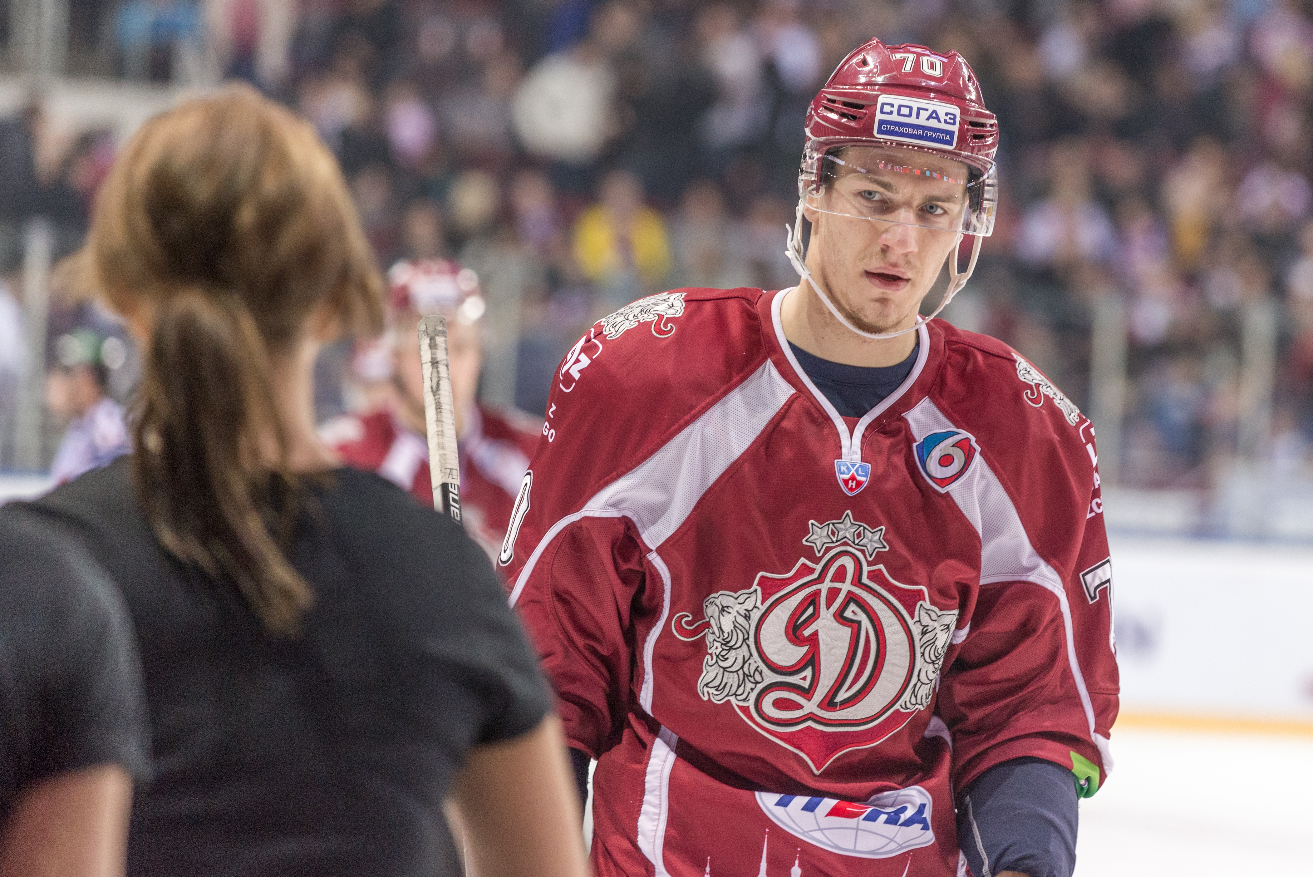 Miks Indrasis Dinamo Riga vs HC Lev Praha 2013-12-28, Arena Riga